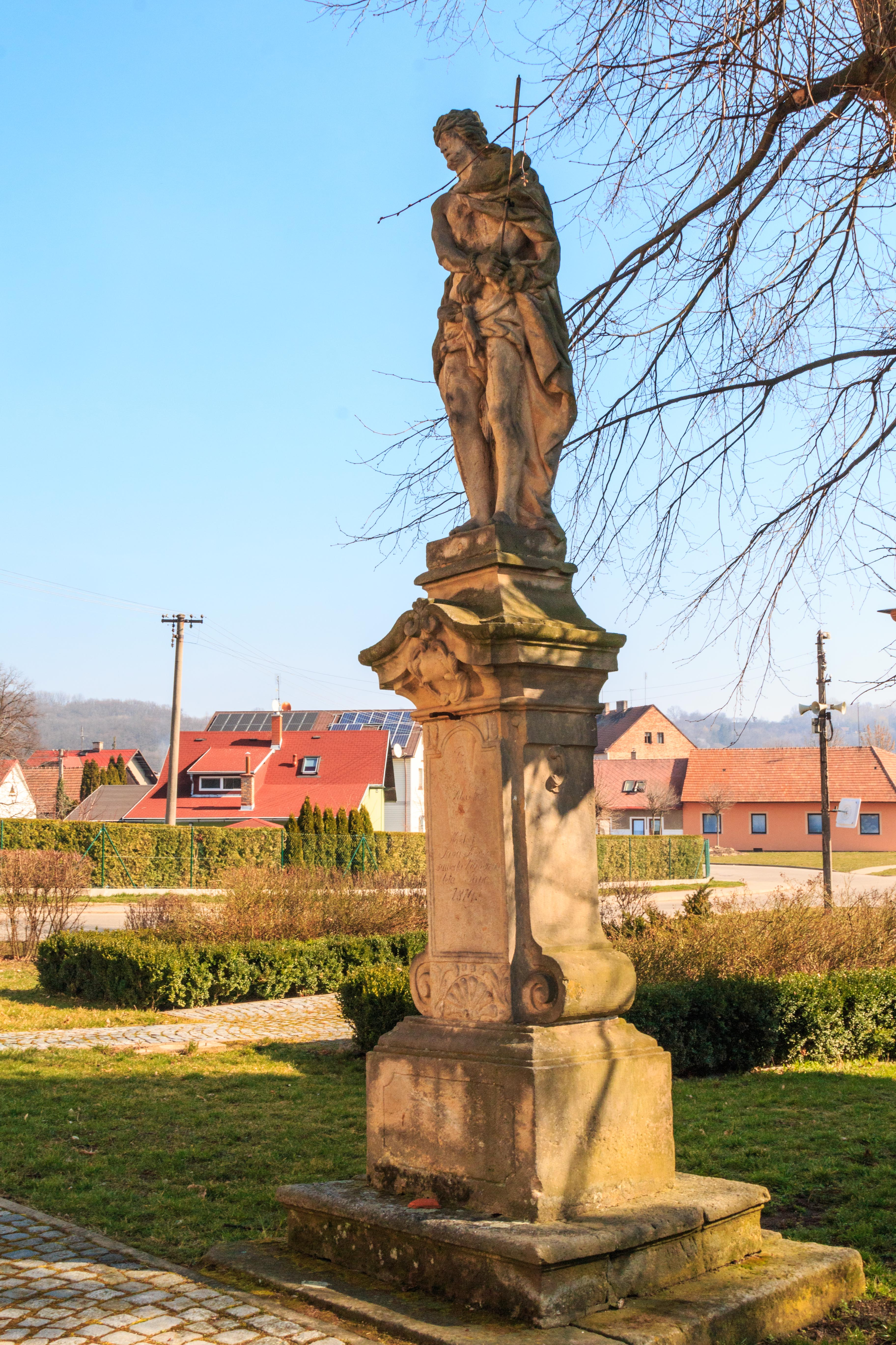 Socha Ecce Homo, pp. 1466/1, Libáň.